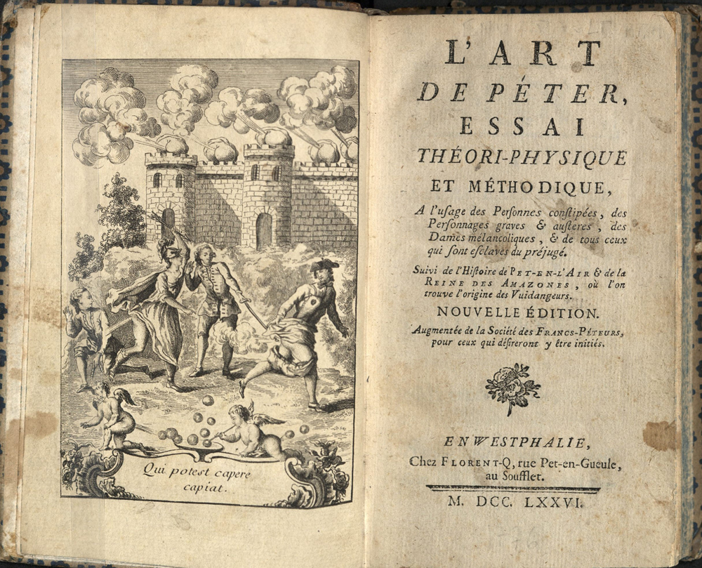 Pierre-Thomas-Nicolas Hurtaut. L’art de péter. En Westphalie, [i.e. Paris]: Chez Florent-Q, rue Pet-en-Gueule, au Soufflet., MDCCLXXVI [1776]